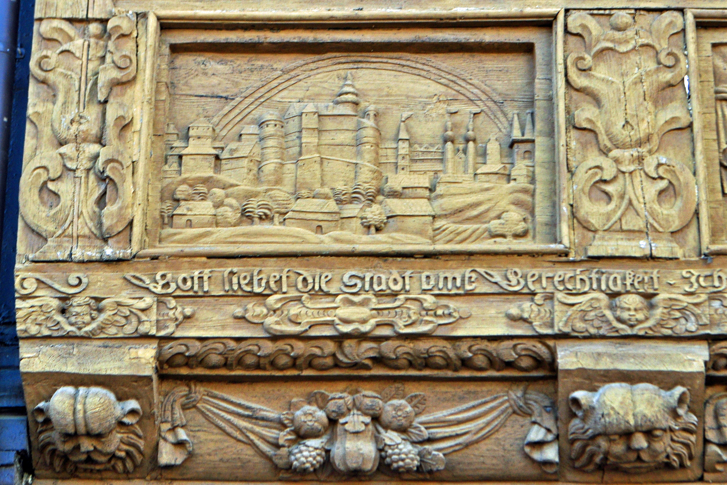 Krummelsches Haus (Wernigerode), Detail (Juni 2013).